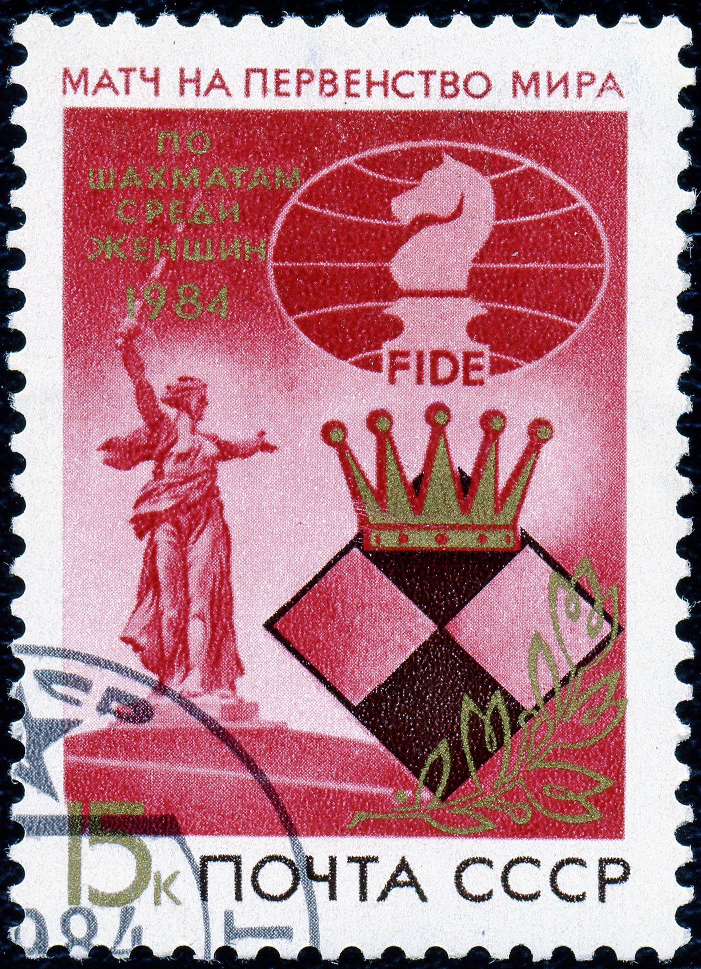 Почтовая марка СССР. 1984. Матч на первенство мира по шахматам среди женщин